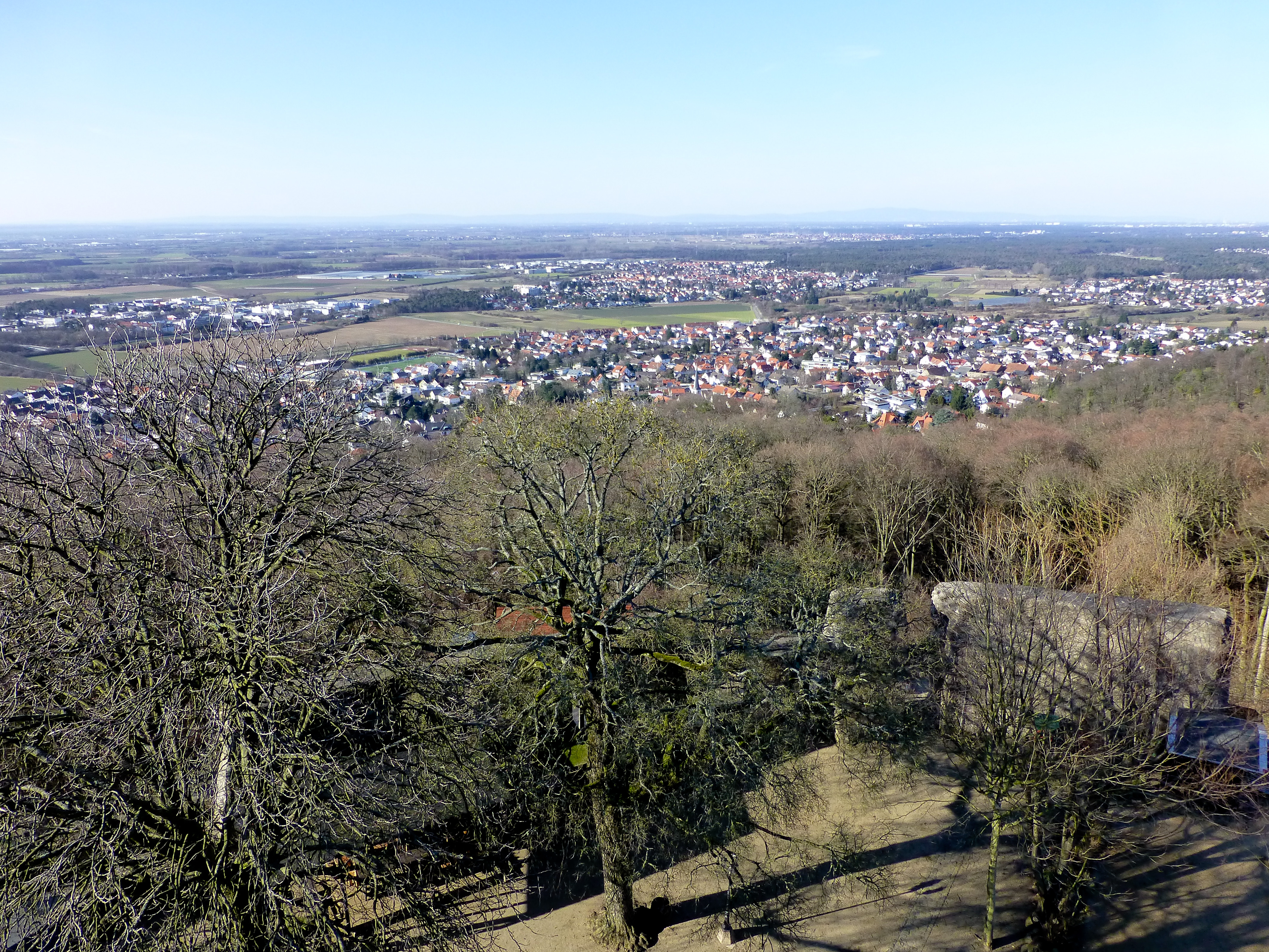 Blick vom Bergfried des Alsbacher Schlosses nach Nordnordwesten; vorne Alsbach, mittig dahinter Bickenbach; weiter entfernt mittig rechts Pfungstadt und am Horizont der Taunus